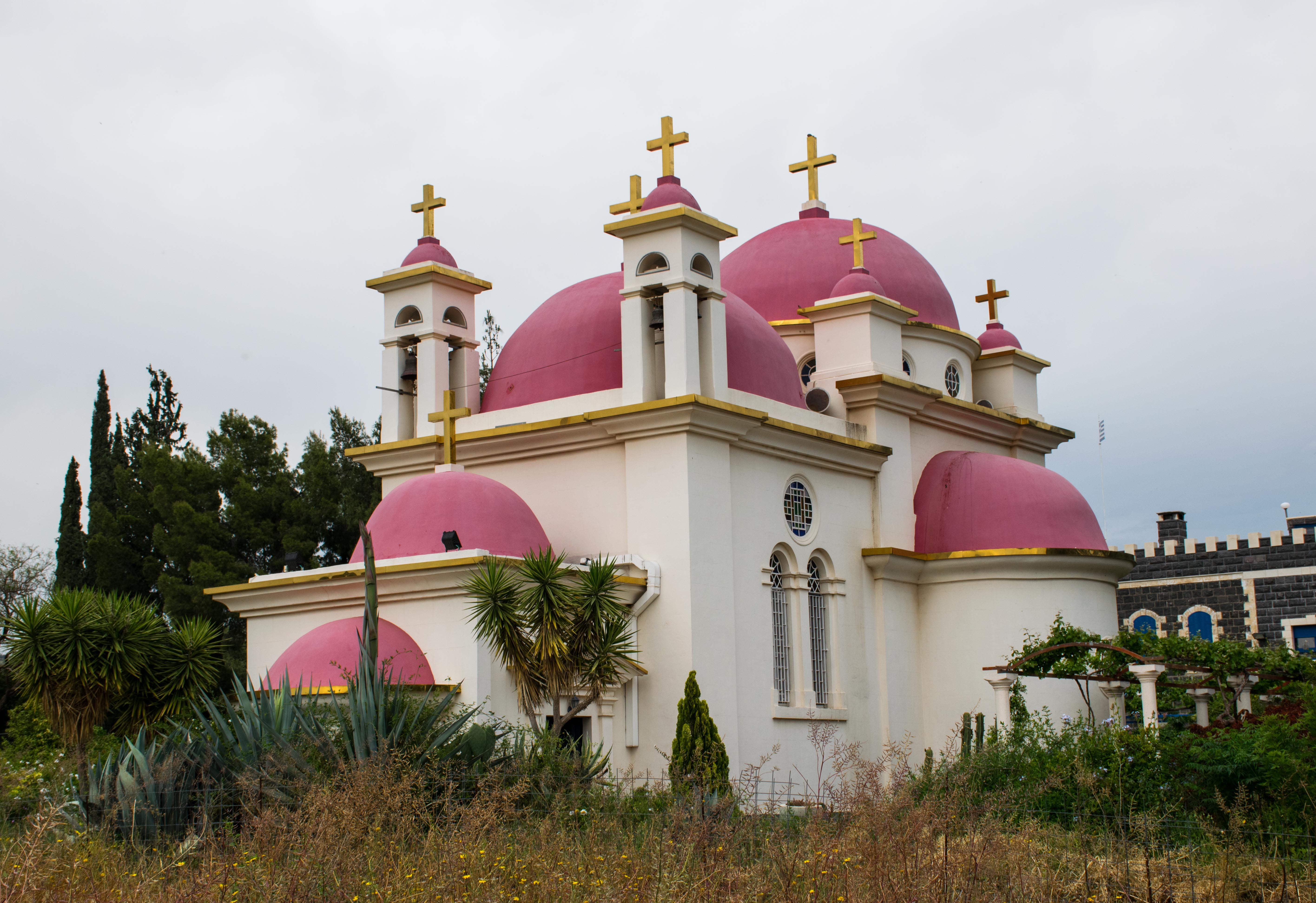 DSC_1686.jpg Tiberias